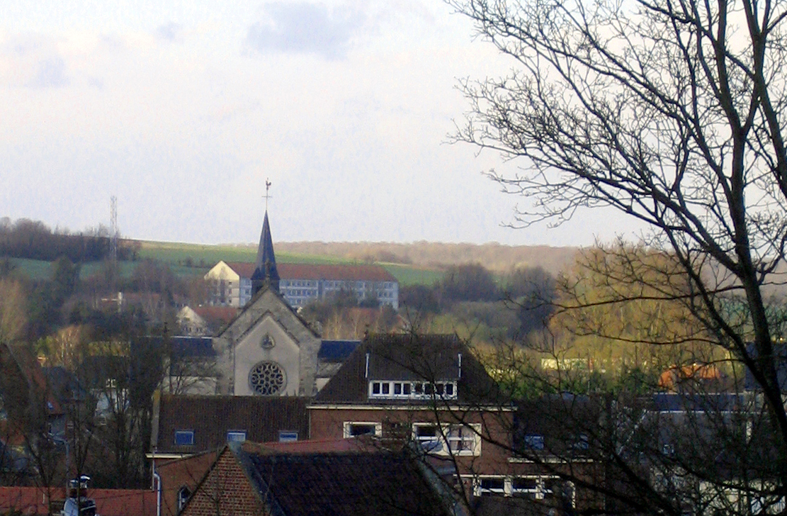 Doullens (Somme, France) - Panorama partiel de la ville, avec son église. Vue vers le Nord, depuis l'entrée de la Citadelle, au bord de la Route Nationale 25, à gauche (en provenance d'Amiens).